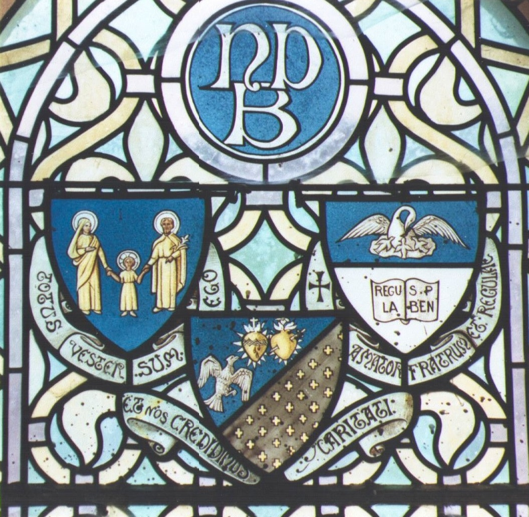 Vitrail de l'Abbaye de Bonnecombe, détail, (du temps de la communauté de l'Arche).